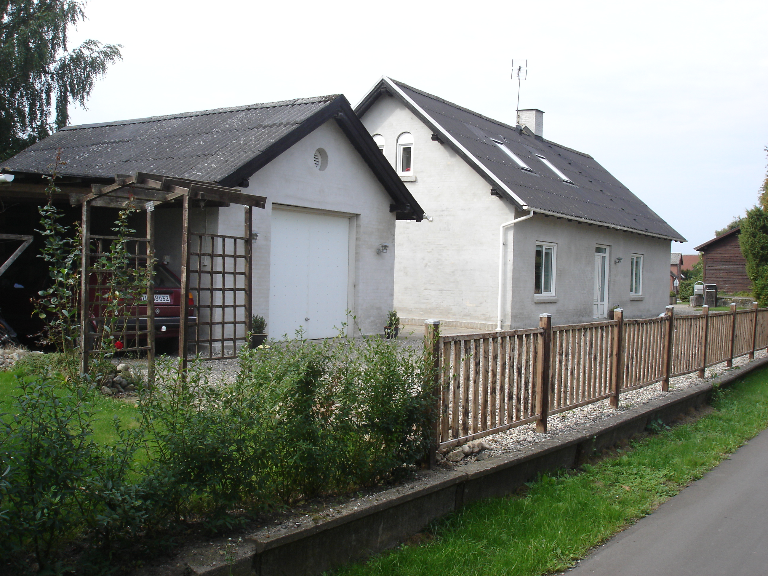 Veddum Station fra sporsiden